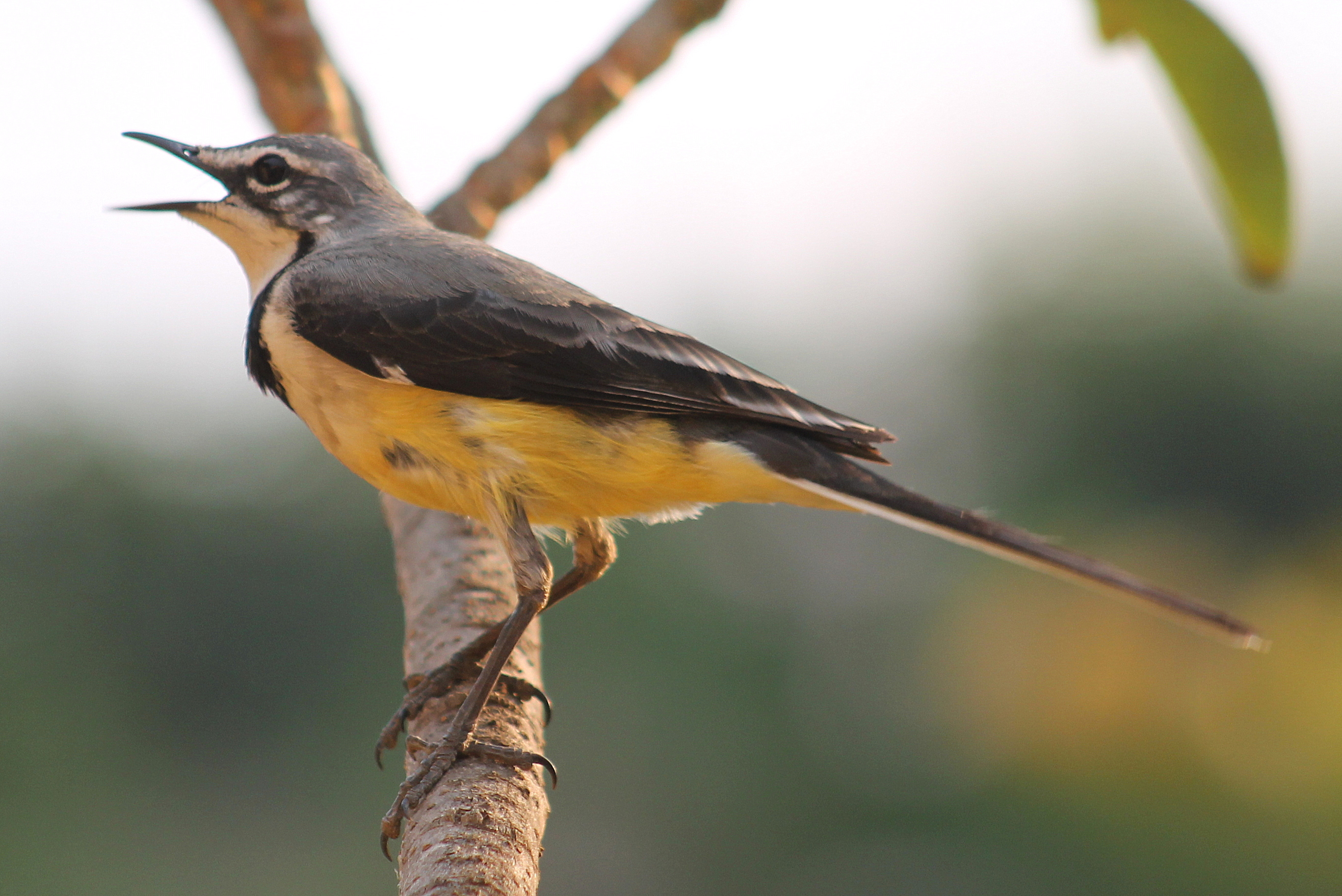 Madagaskarkwikstaart, crop